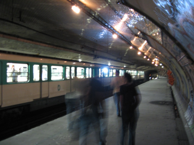 Journées du patrimoine RATP 16-17/09/2006. Croix-Rouge